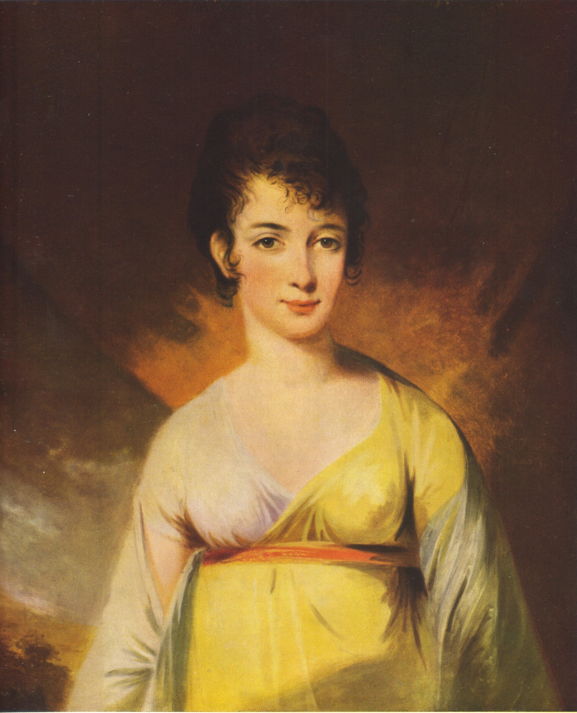 Martina von Schwerin, neé Törngren (1789-1875).